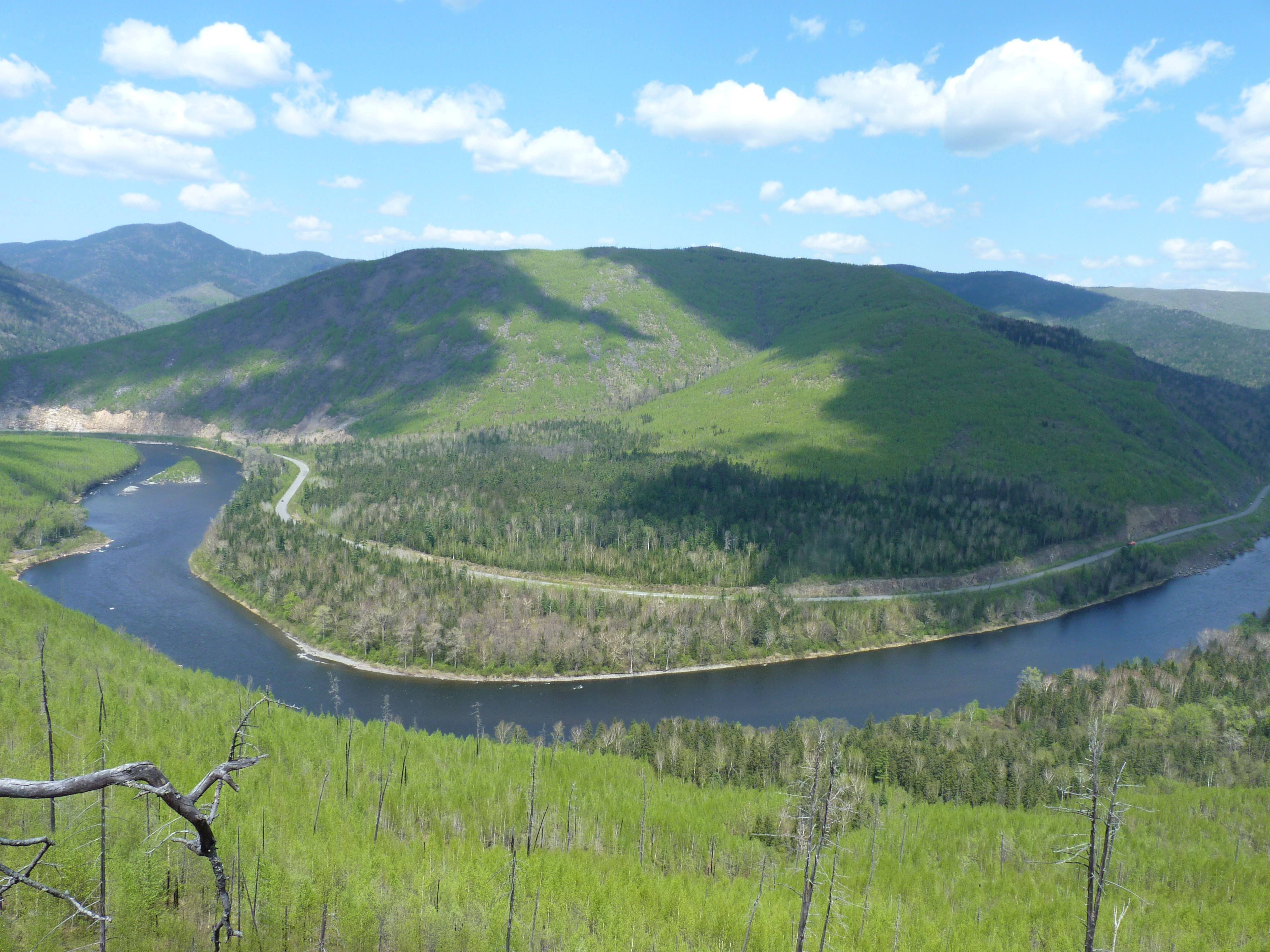 Анюйский национальный парк. Находится в юго-восточной части Нанайского района Хабаровского края, в кедрово-широколиственных лесах на западном склоне Центрального Сихотэ-Алиня. This image is related to the protected area of Russia number 2700149